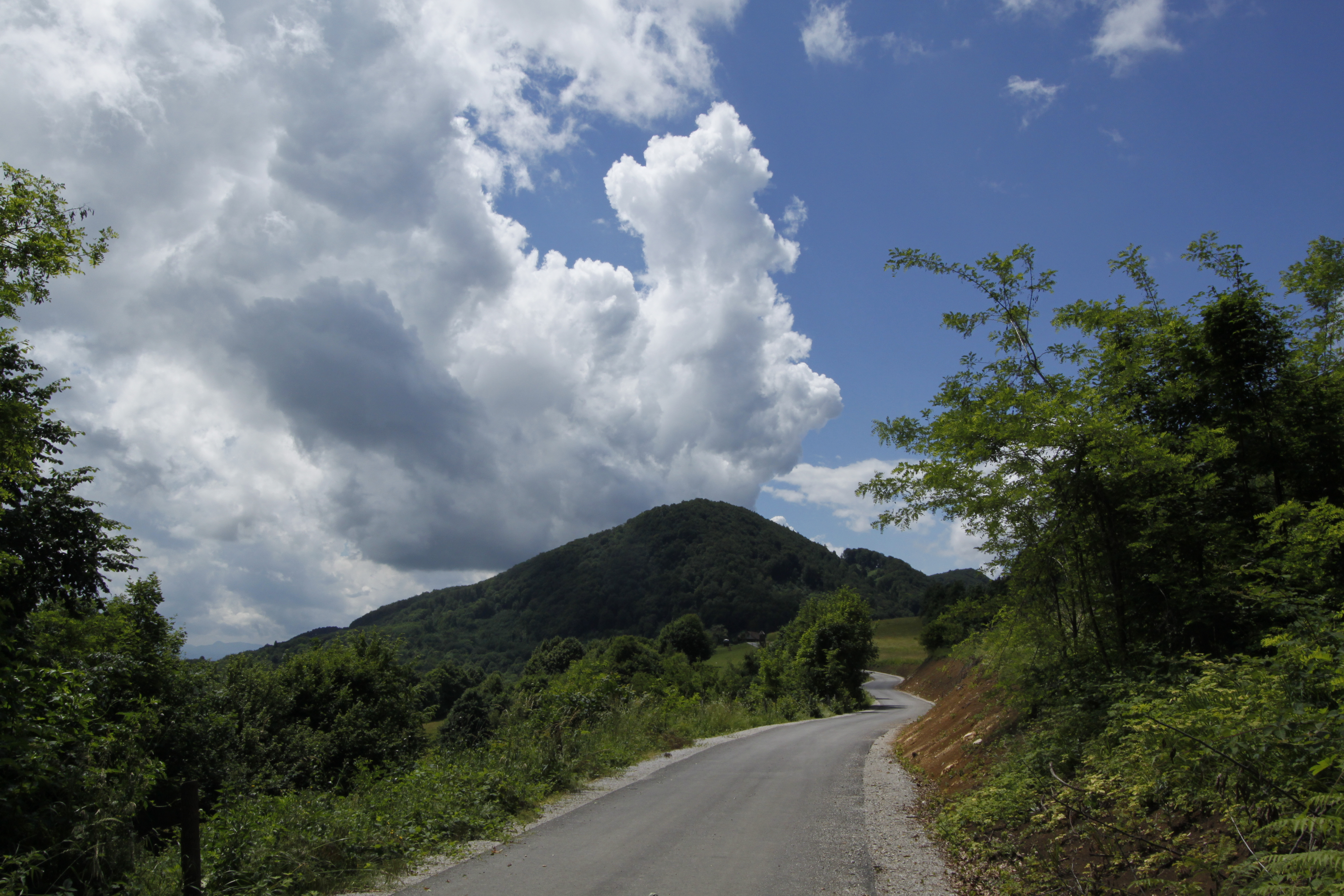 kumulusi nad Velikim Špičekom